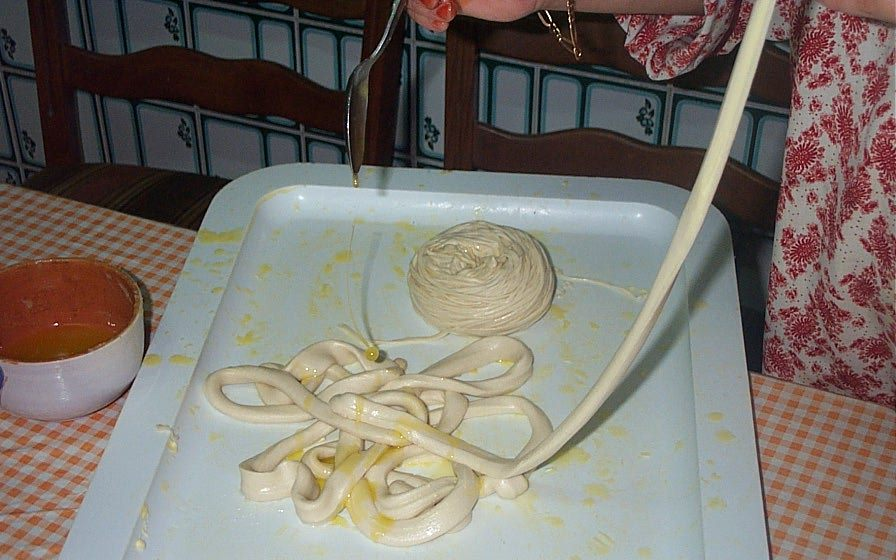 Plato marroquí 3